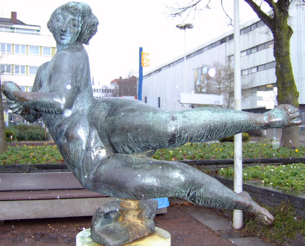 Waldemar Grzimek: Die Welle (1967) Standort: Bonn – Brassertufer - 2010 entferntMaterial: Bronze